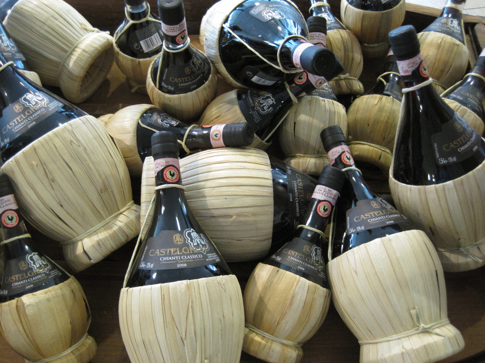 Chianti (wine)